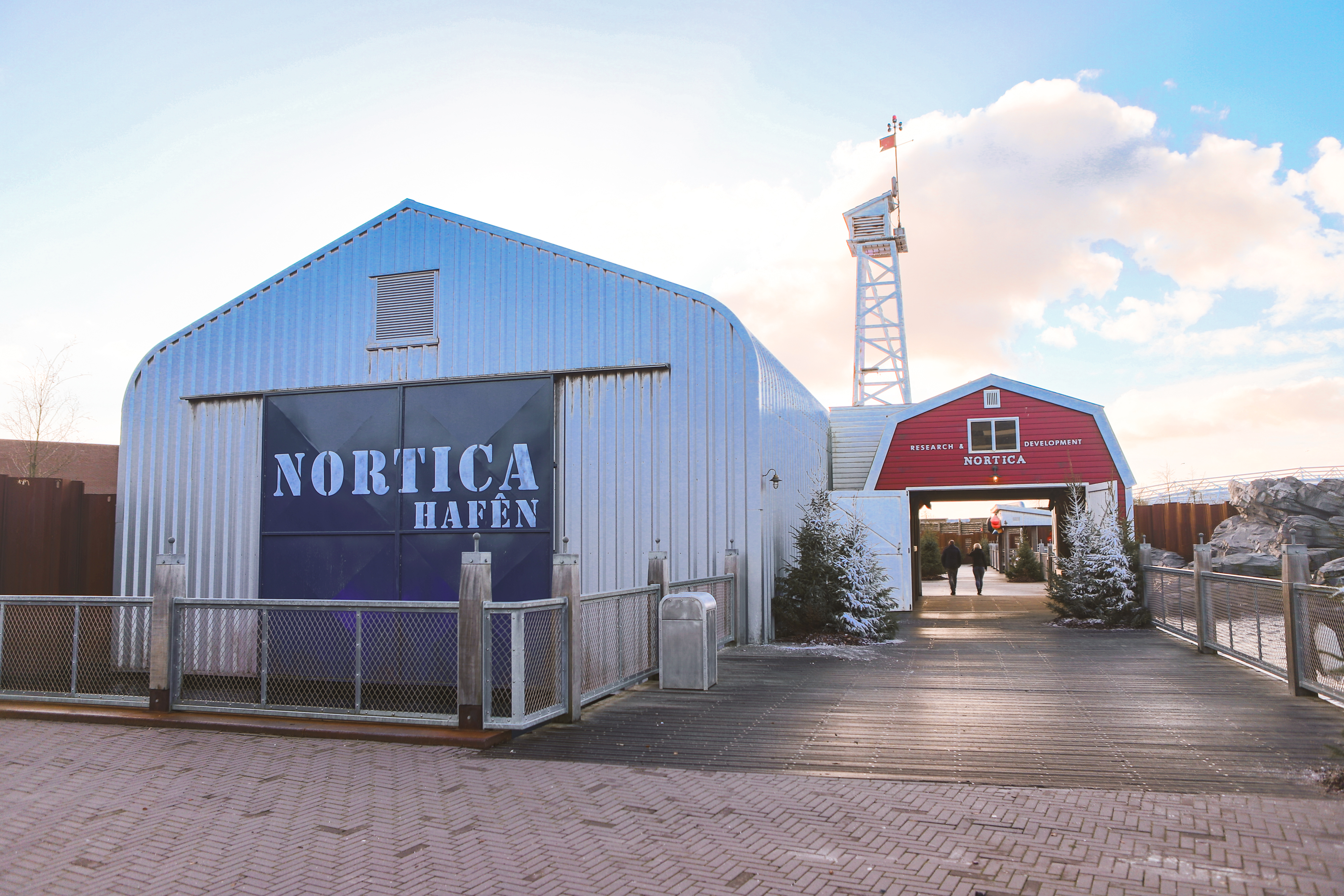 Wildlands Adventure Zoo in Emmen (2019)